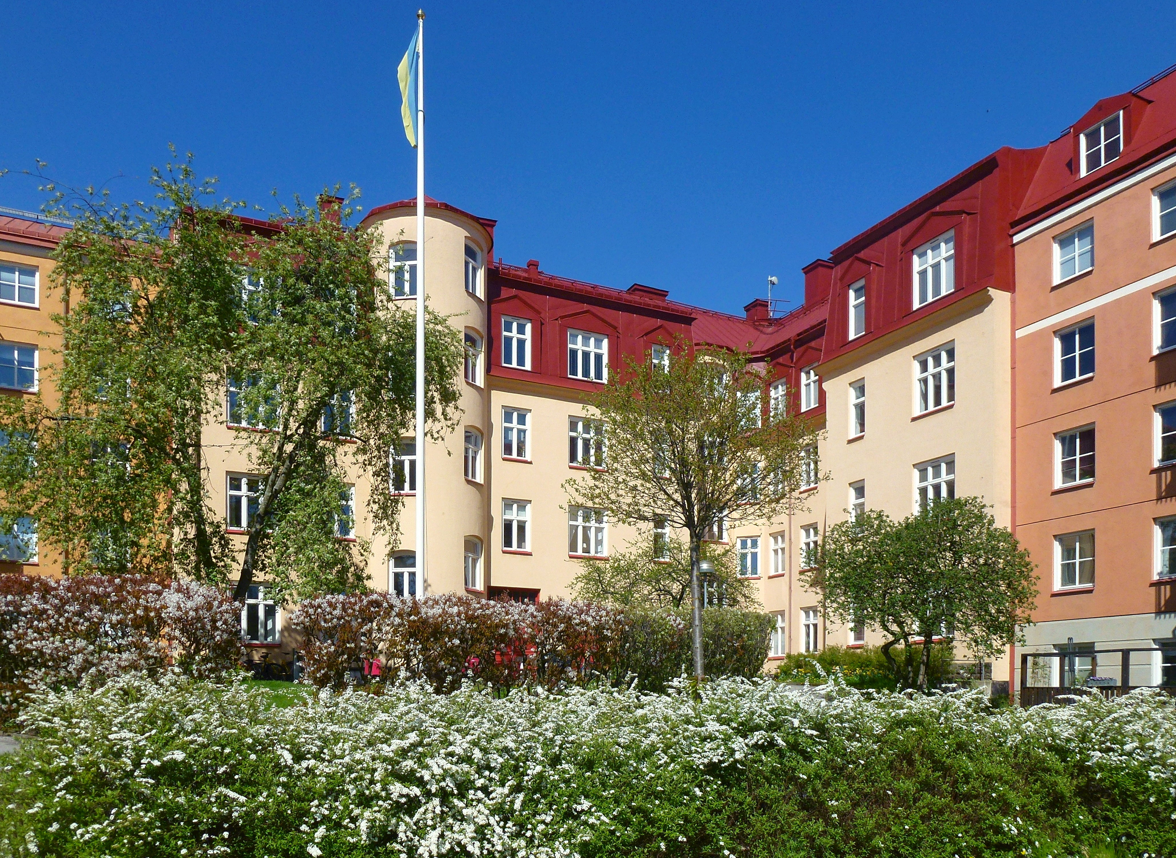 Kvarteret Majhill, Ritorp, Solna (gårdsvy)